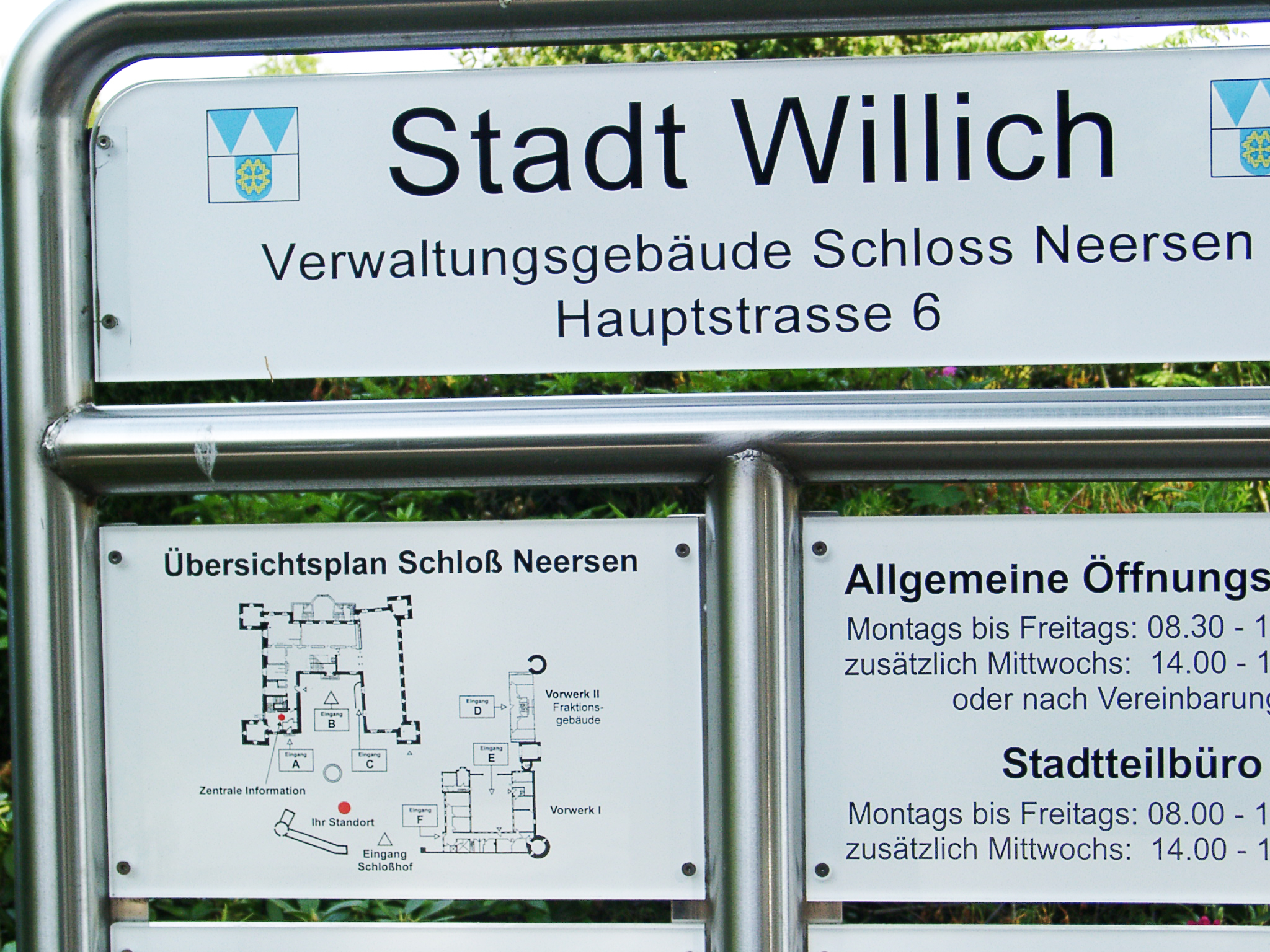 Tafel am Schloss Neersen - selbst fotografiert (16.5.2005)